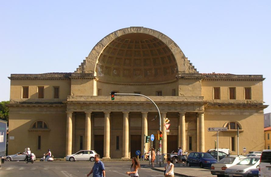 Livorno: il Cisternone (1829-1842), progettato da Pasquale Poccianti e ormai posto ai margini di una piazza utilizzata solo come parcheggio, dietro una selva di semafori e cartelli stradali. A sinistra, non inquadrato nella foto, si erge un palazzo condominiale che con la sua altezza incide negativamente sull'equilibrio architettonico della piazza.